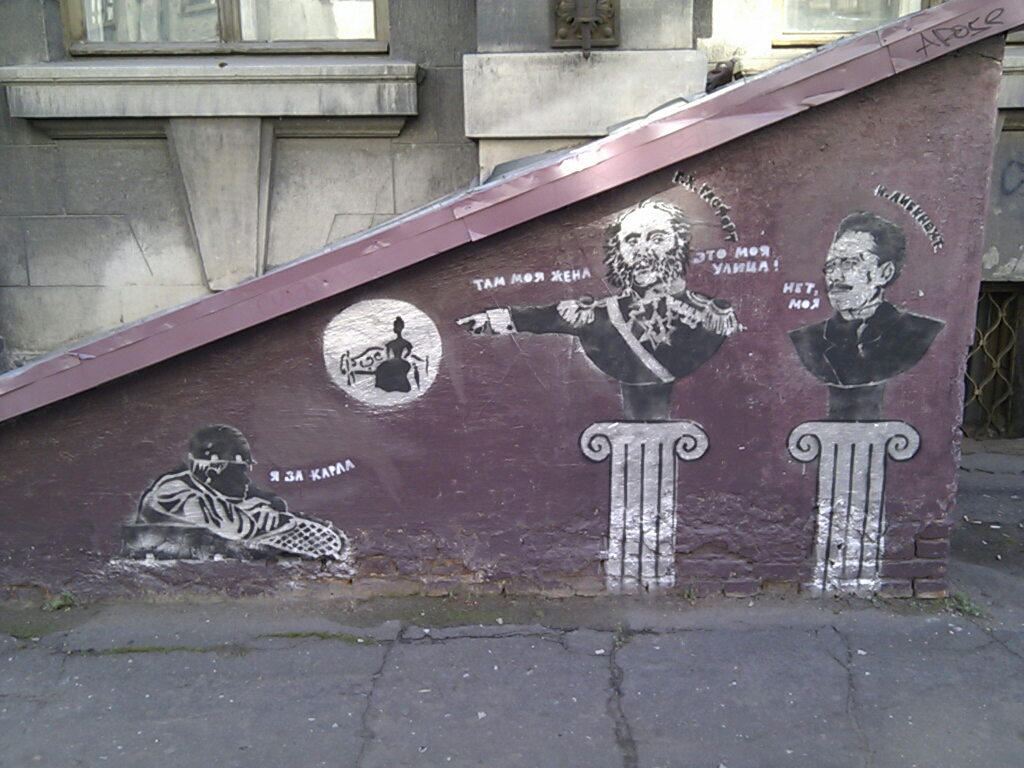 Здание товарищества Тверской мануфауктуры (Омская область, Омск, Либкнехта улица, 4)